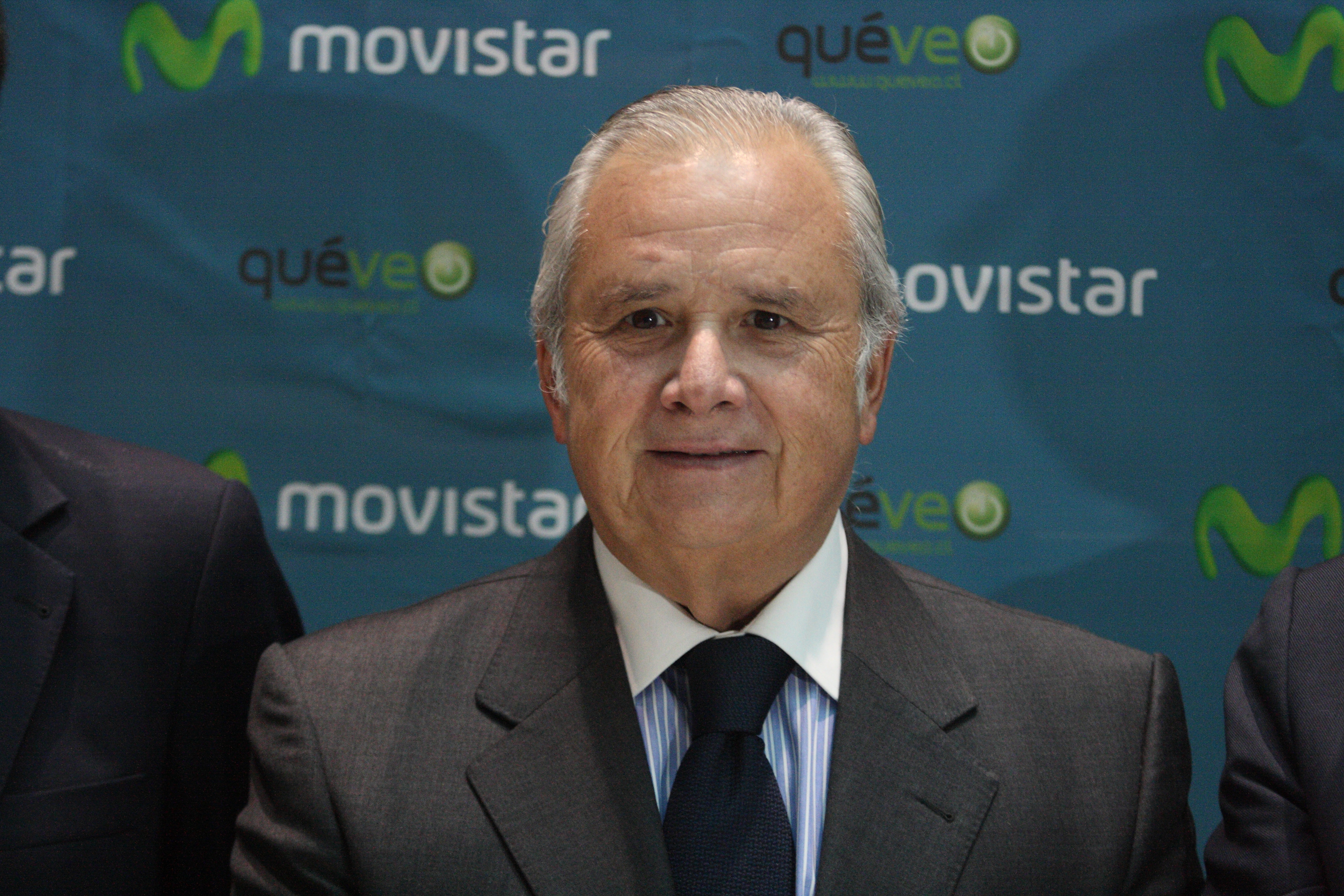 En el auditorio de Telefónica y frente a representantes de medios de comunicación, agencias de publicidad, colegios y alumnos de distintos establecimientos educacionales, la directora de la Biblioteca del Congreso, Soledad Ferreiro, recibió el galardón del segundo lugar obtenido por la página del Torneo Delibera en la categoría Internet juvenil de los premios Queveo.